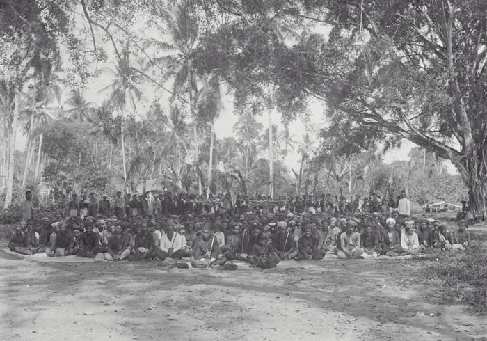 foto. Lokale bestuurders met gevolg die zich zijn komen melden bij de colonnecommandant, Boven Singkil, Atjeh